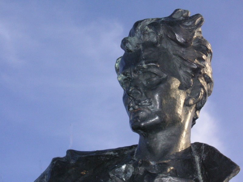 Carl Eldh, Den unge Strindberg i skärgården